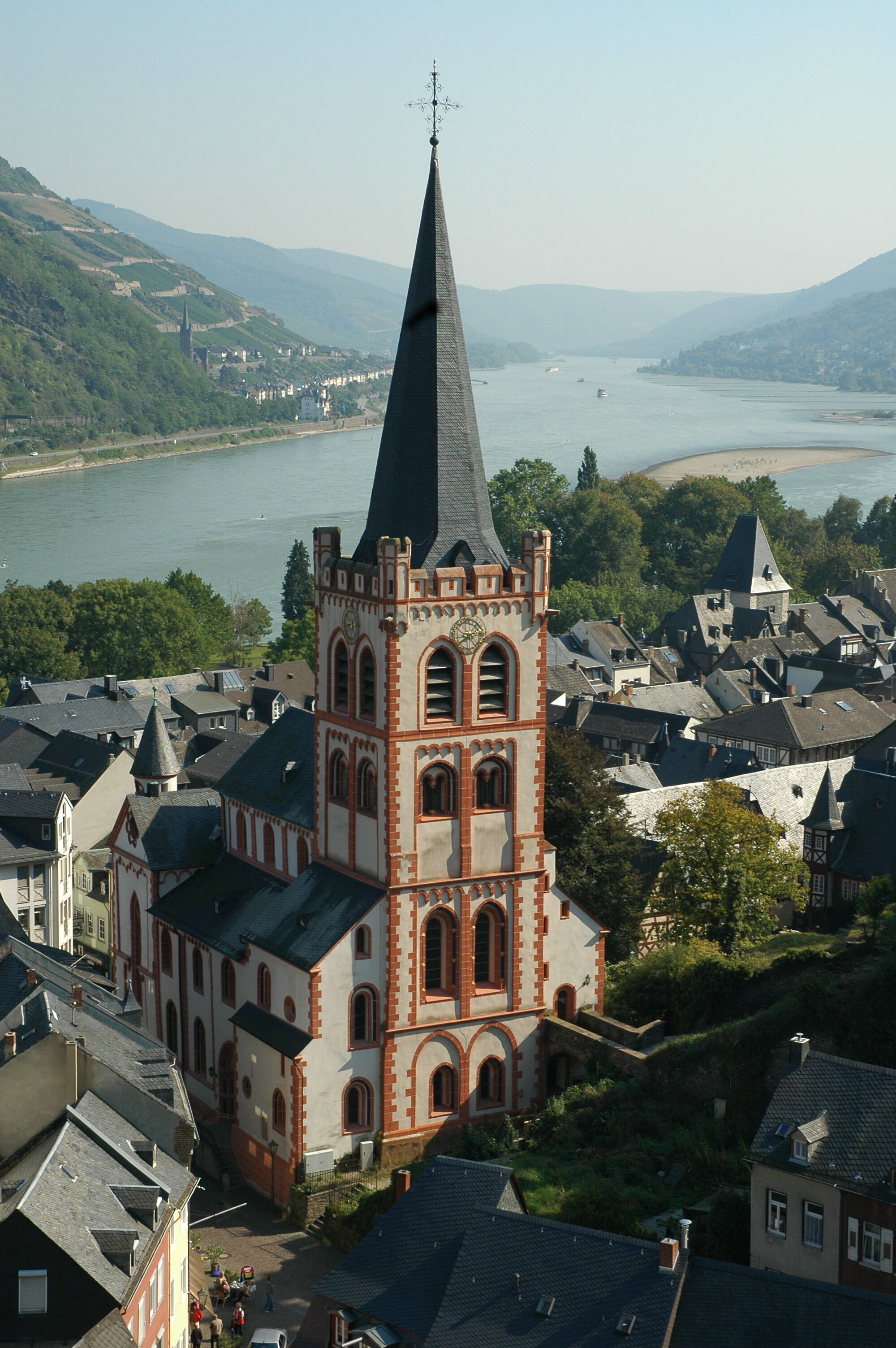 Evangelische Kirche St. Peter